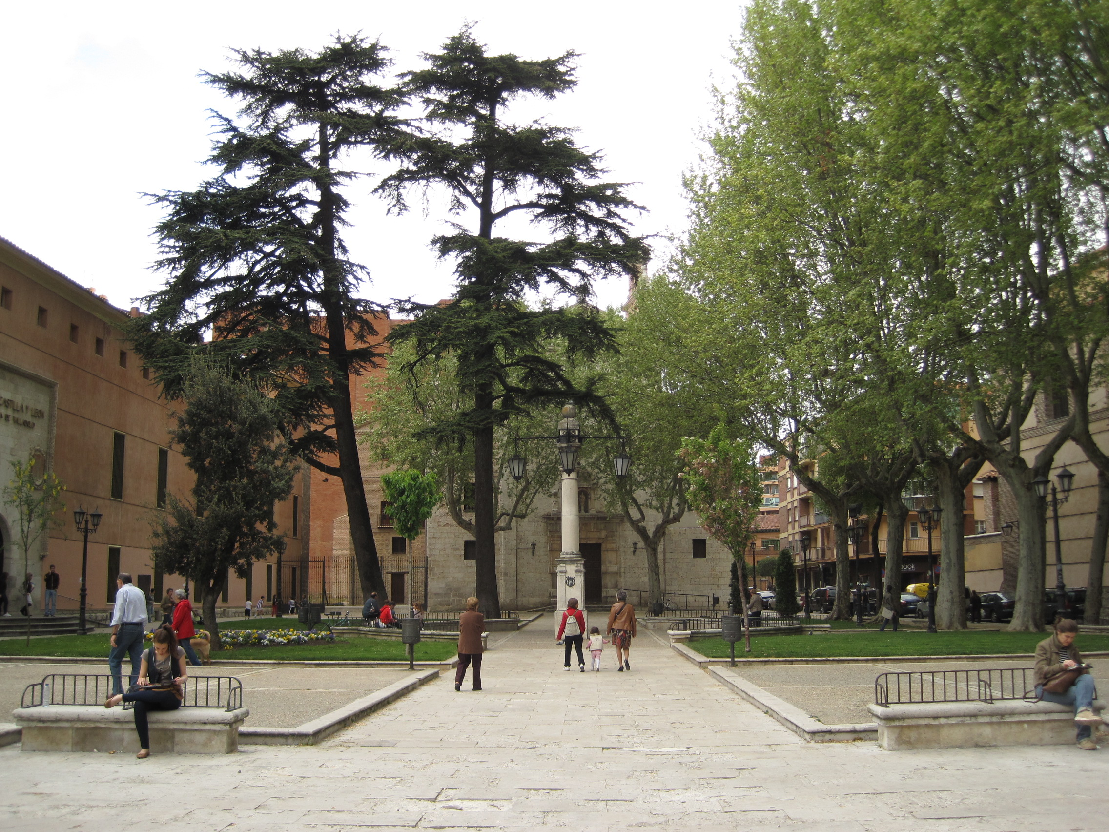 Vista general de la plaza de la Trinidad, en Valladolid, España.